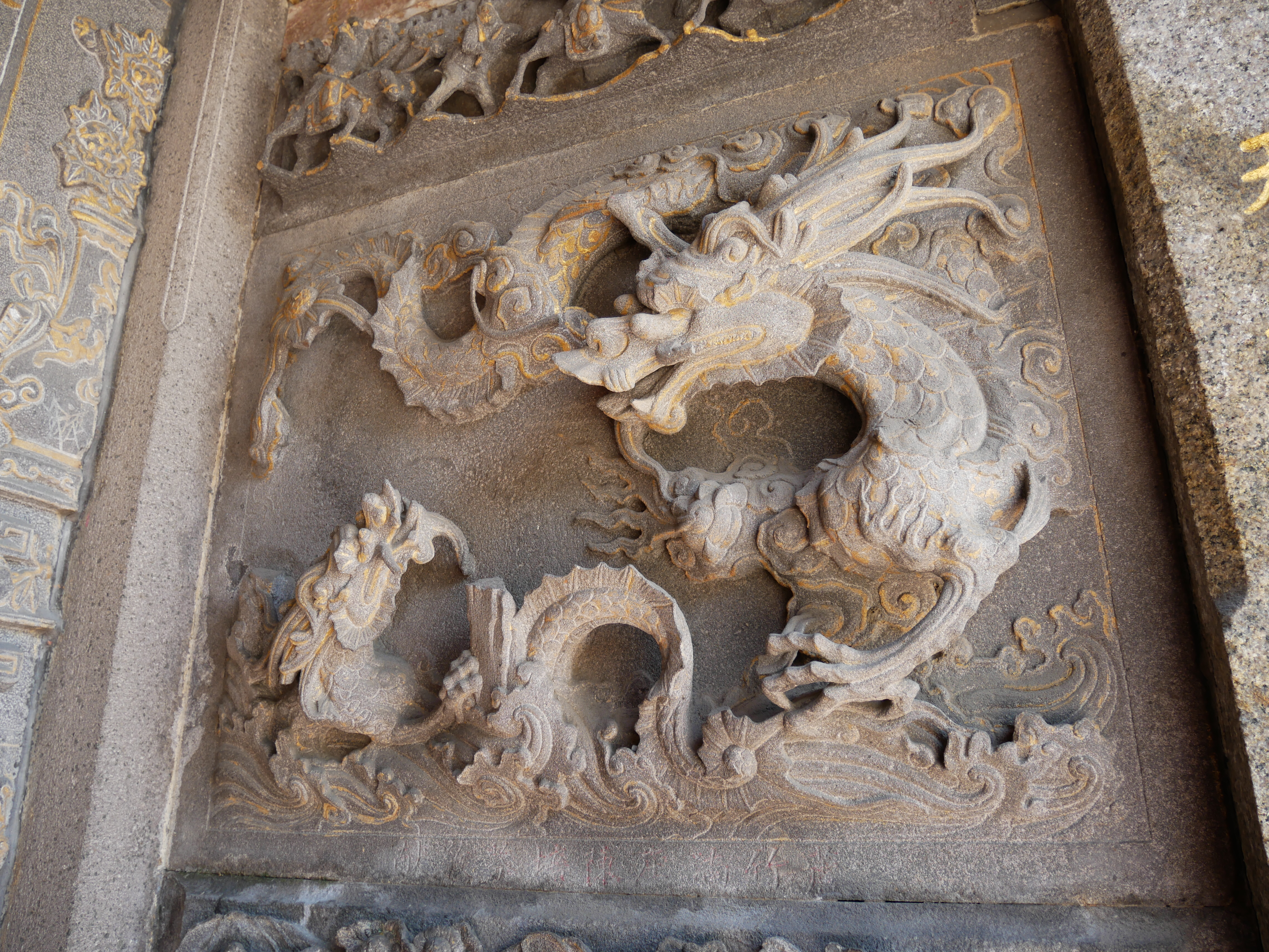 中港慈裕宮龍邊對看堵石雕，苗栗縣竹南鎮中美里